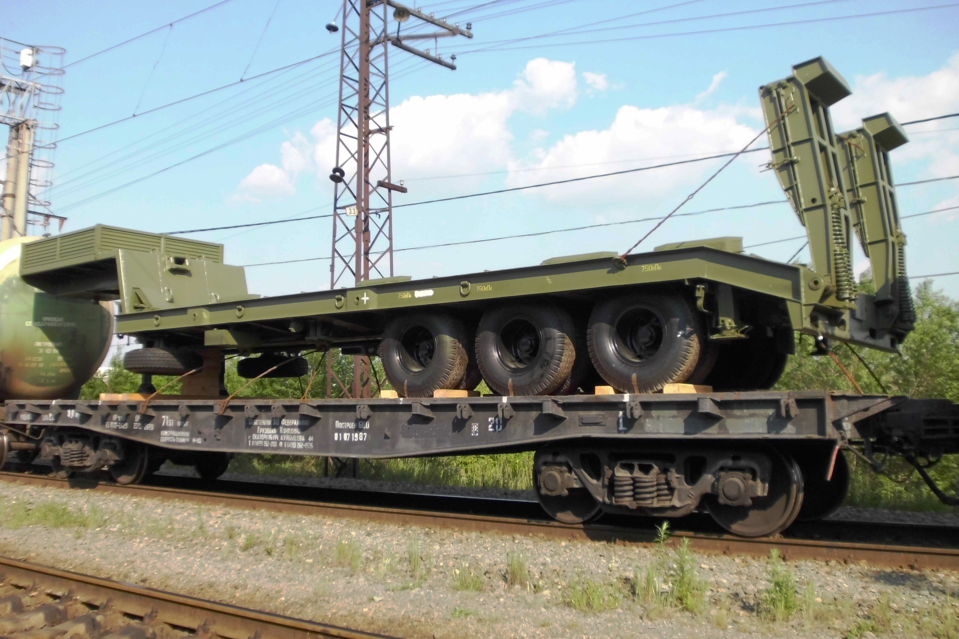 Автомобильный полуприцеп ЧМЗАП-9990 для перевозки тяжёлой техники (колёсной, гусеничной) транспортируемый на железнодорожной платформе. Производитель - Челябинский машиностроительный завод автомобильных прицепов.